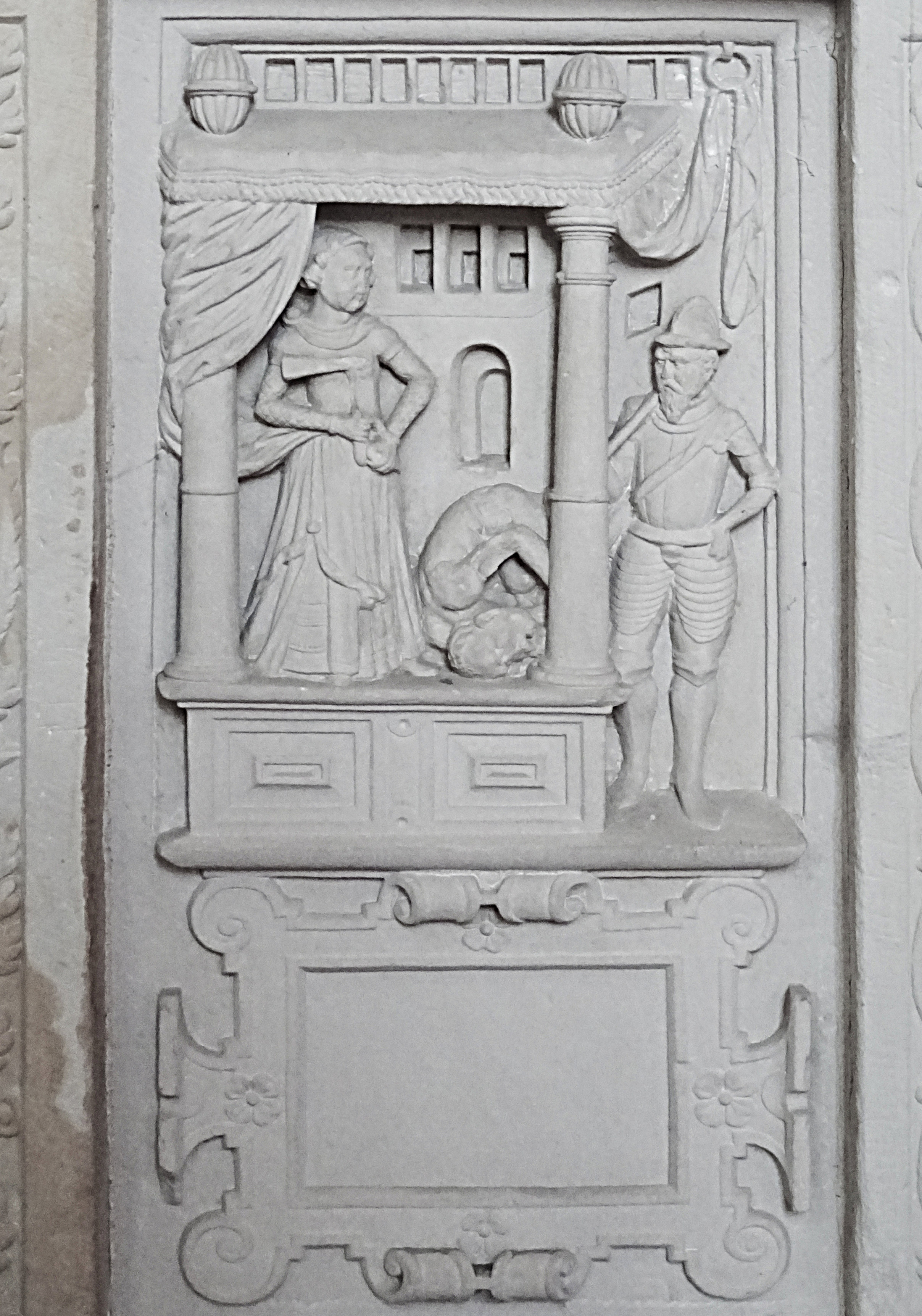 Steinbilderbibel in der St. Annenkirche (Eisleben), 21/29, Jaël tötet Sisera